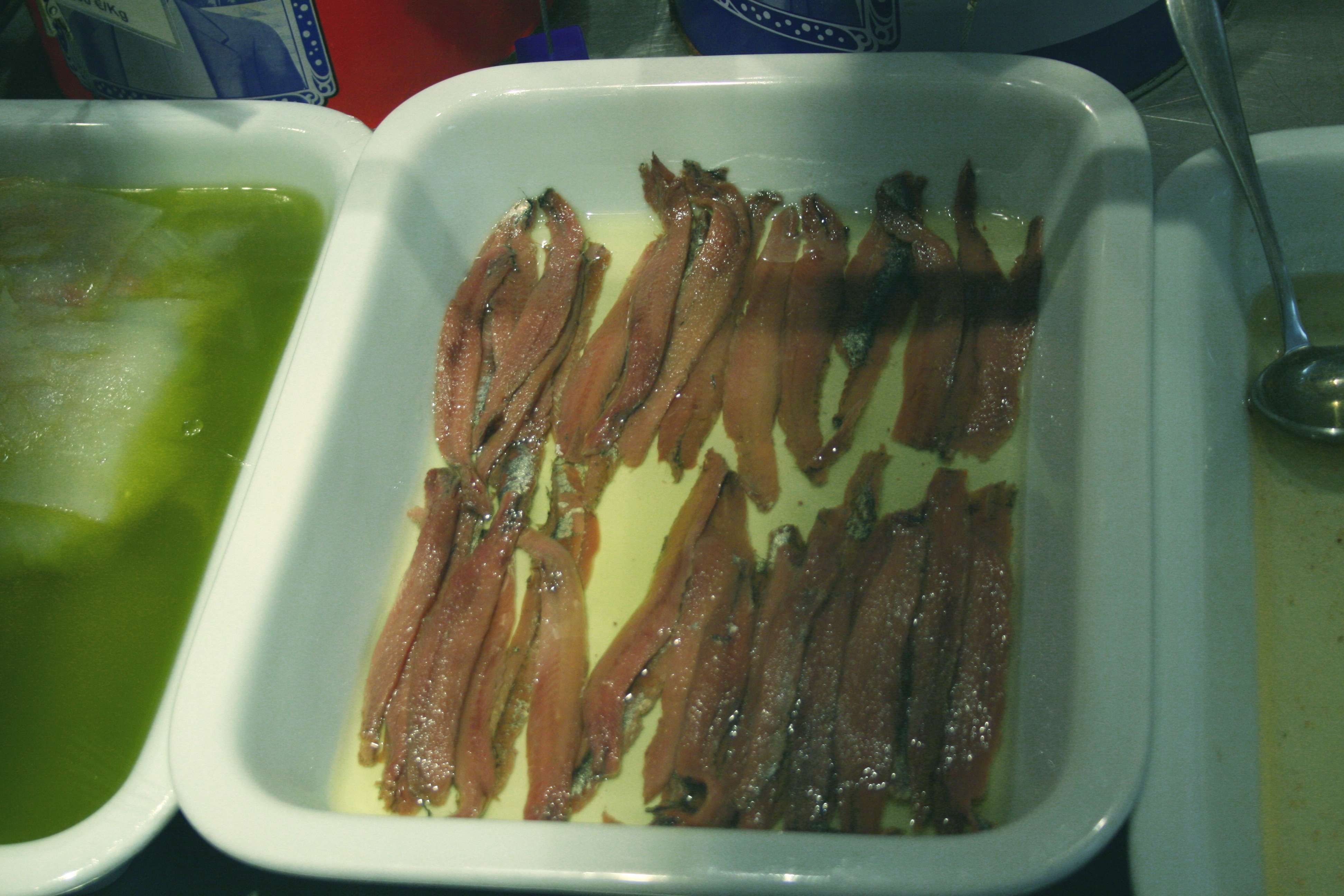 Anchoas en aceite